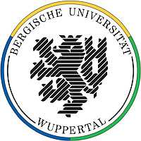 ヴッパータール大学ロゴ